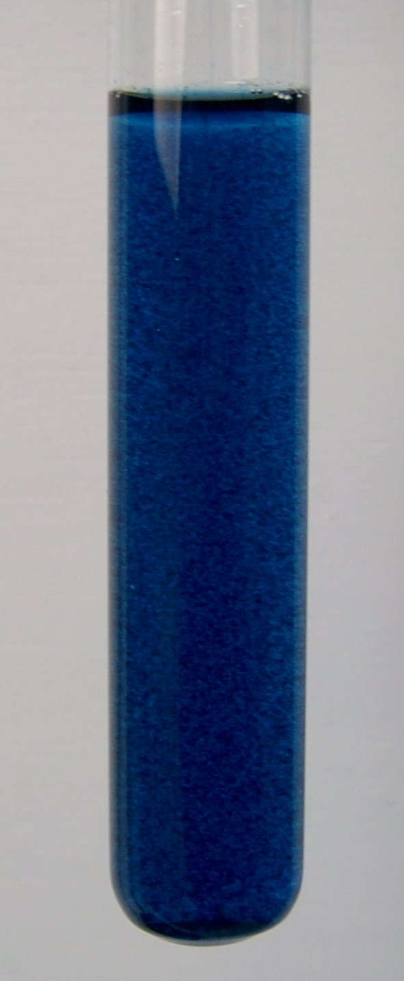 Fällung von Berliner-Blau aus einer Eisen(III)-chloridlösung mit Kaliumhexacyanoferrat(II)